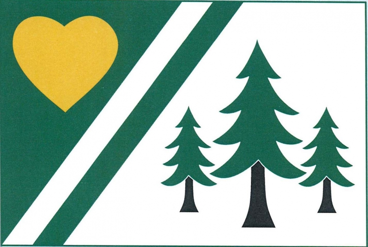 vlajka, Rozkoš, okres Znojmo